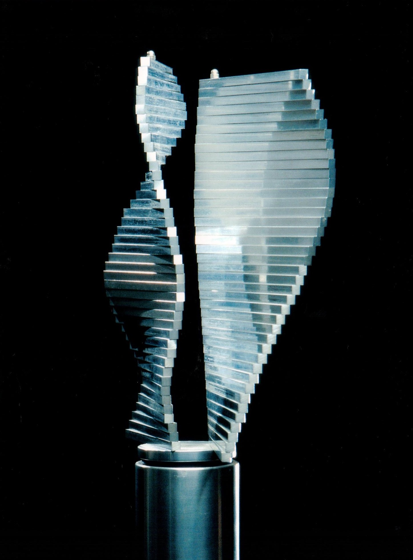 Metallplastik, Stahl, flexibel , ca. 1970